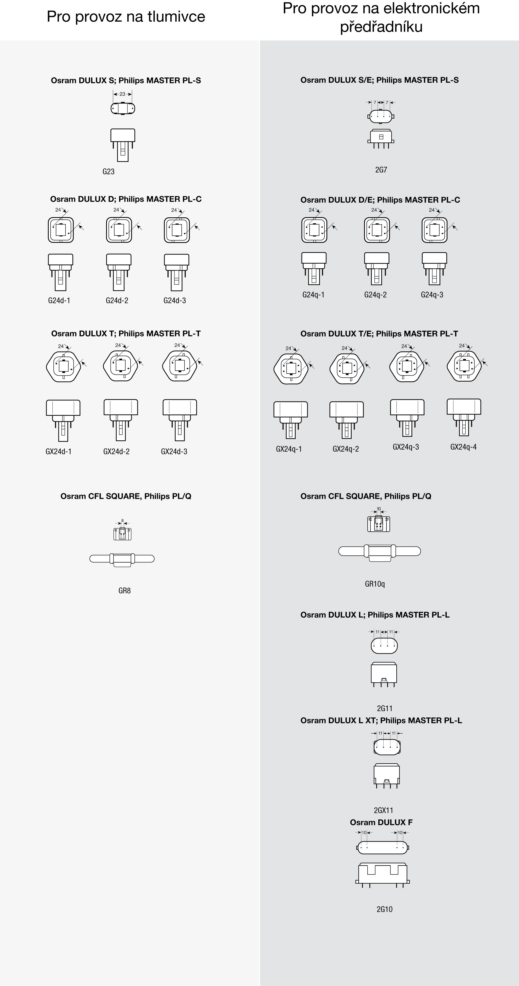 Přehled patic a výrobních řad kompaktních zářivek